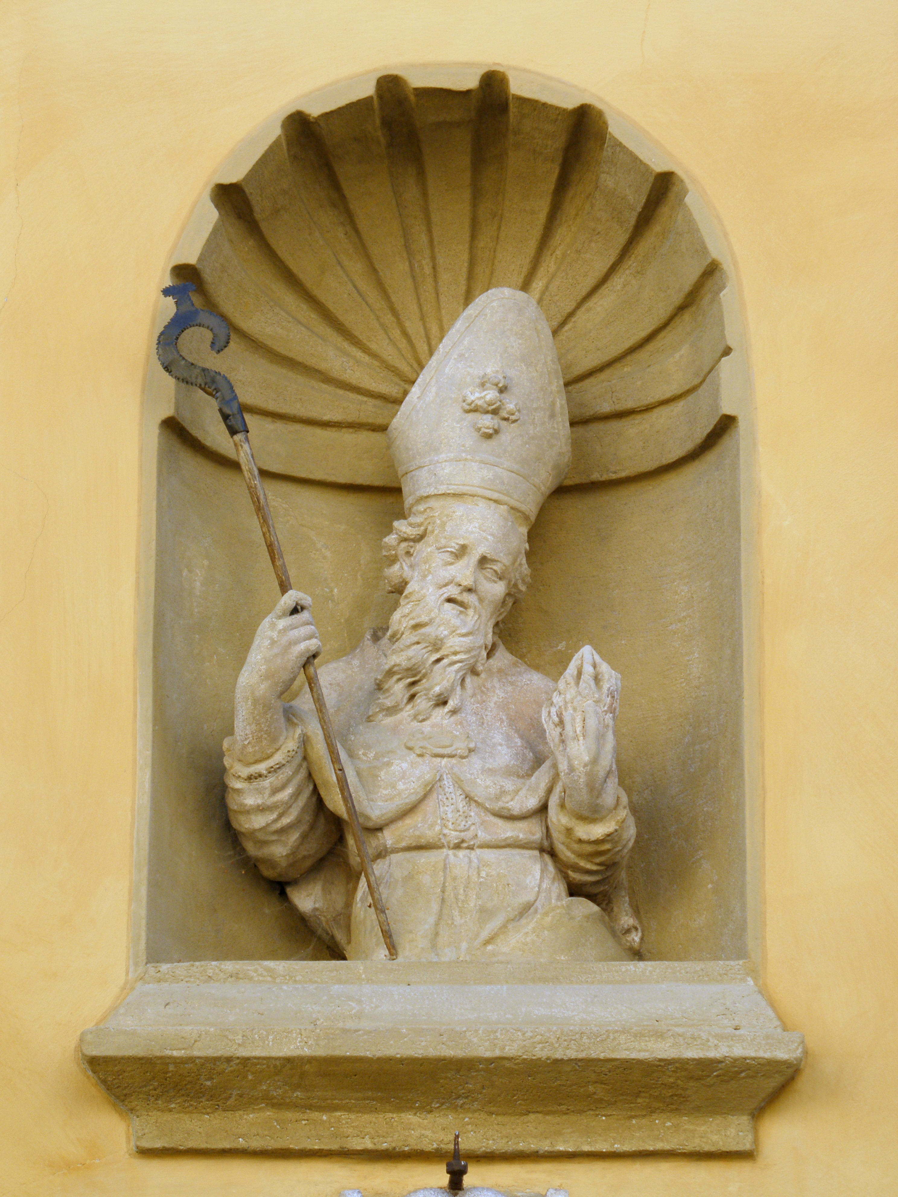 Rovigo, chiesa di Sant'Antonio abate, detta di San Domenico: la statua di Sant'Antonio abate che orna l'ingresso di sinistra alla chiesa.